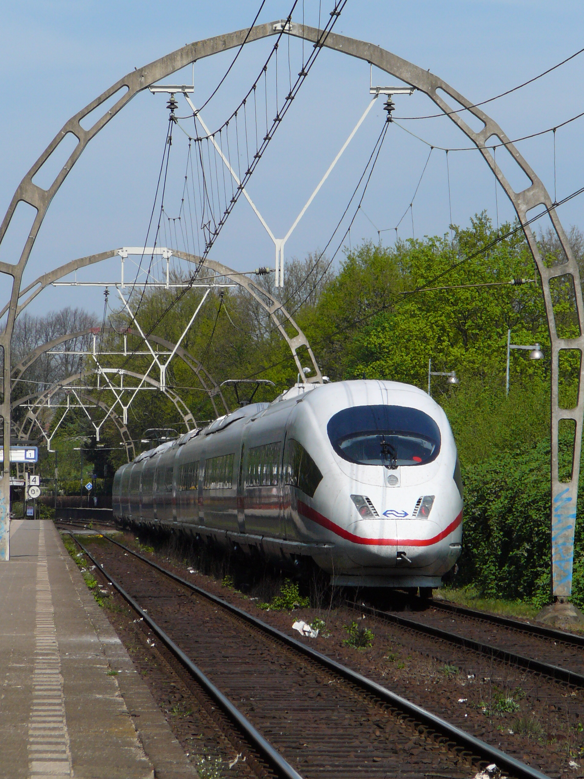 4654 Frankfurt - Amsterdam, Hilversum Sportpark